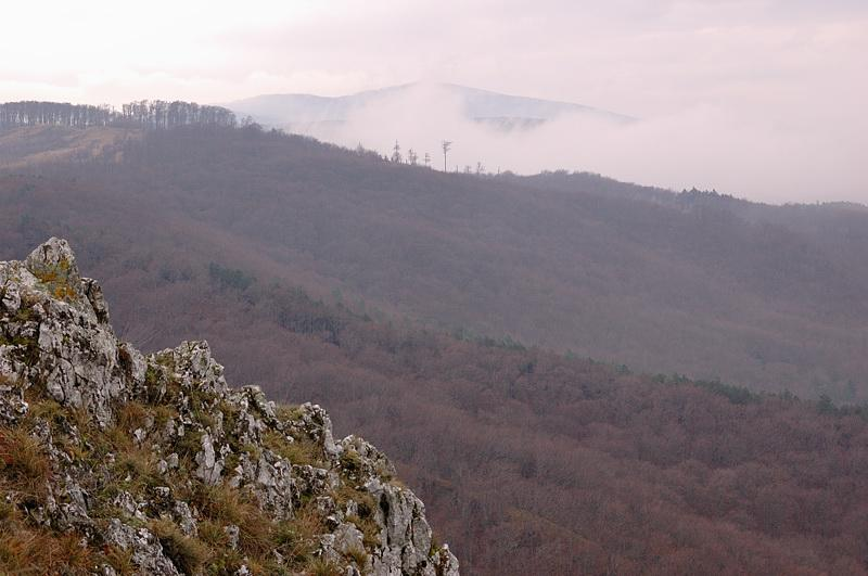 Осень в Зейском заповеднике